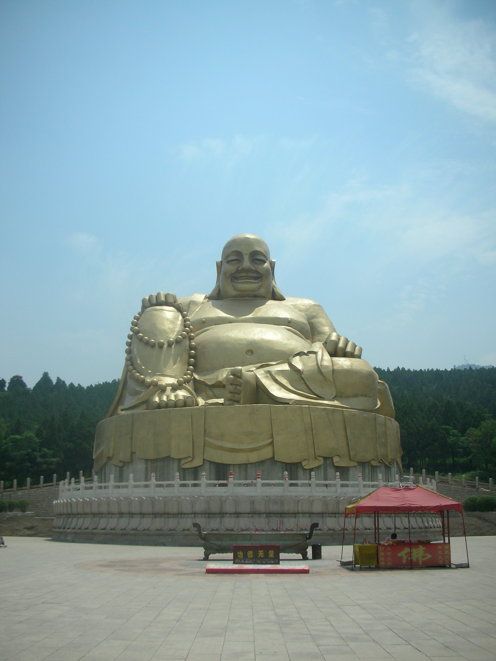 千佛山大佛